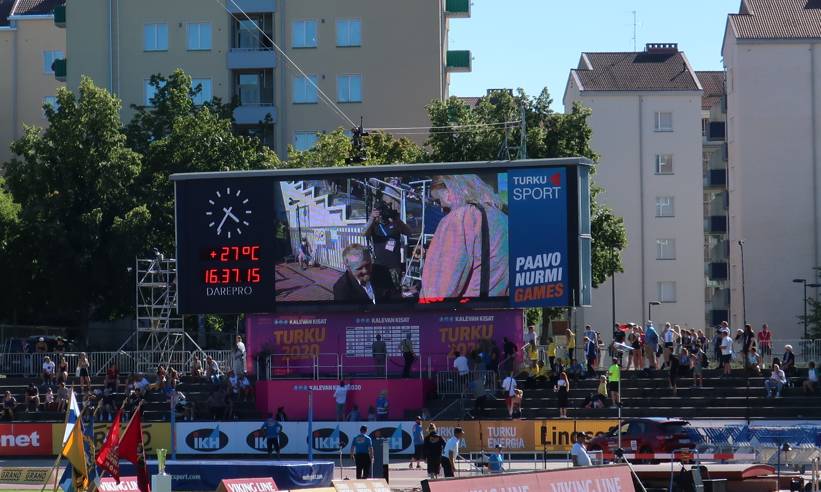 Paavo Nurmen stadionin tulostaululla näytetään, kun keihäänheittovalmentaja Tuomas Laaksonen kosii stadionilla morsiantaan, vuoden 2020 Kalevan kisojen pääsihteeriä Veera Sahlbergia